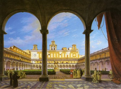 Le Cloître de la Chartreuse de san Martino